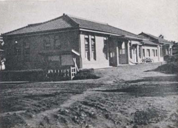 中文（台灣）: 八塊庄役場，已拆除